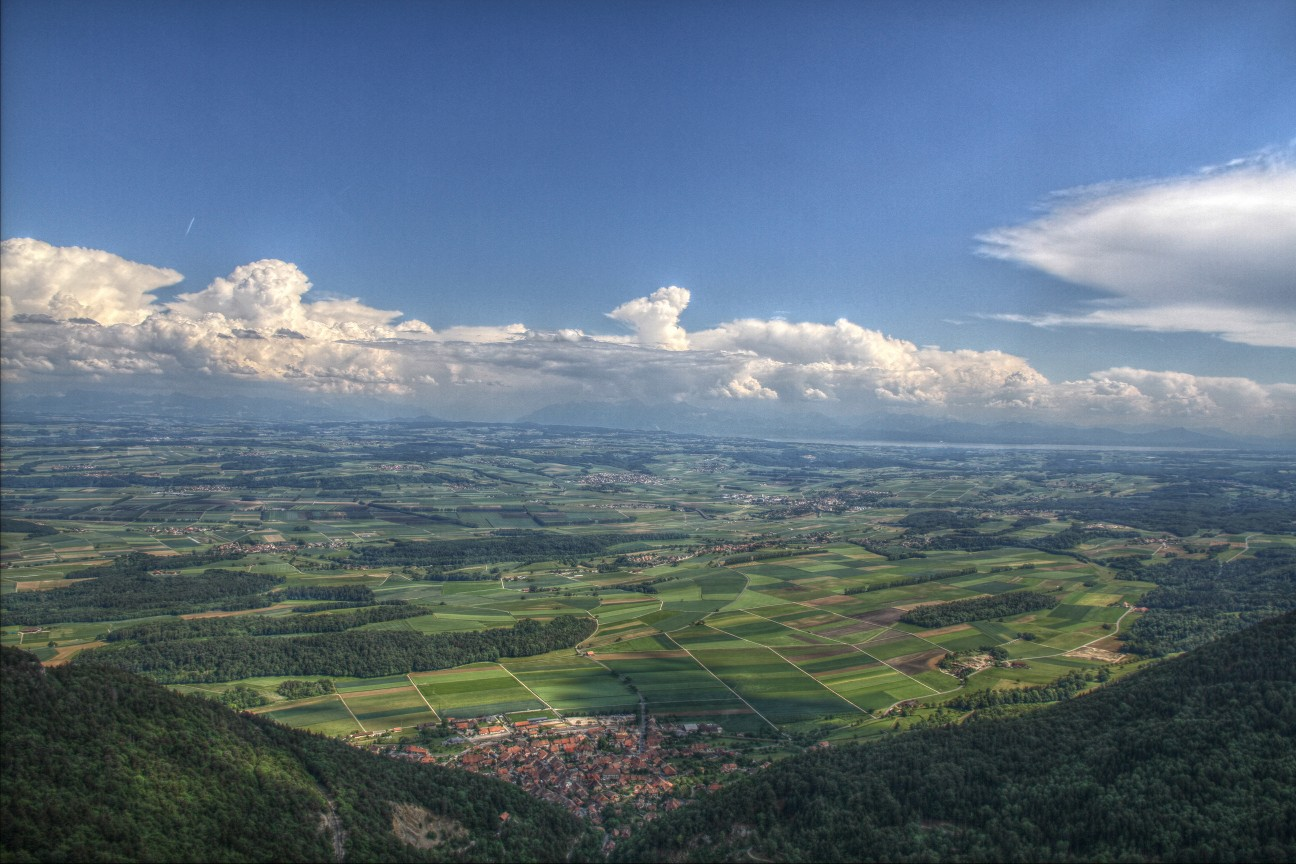 Baulmes vu du Mont de Baulmes - Photo en HDR